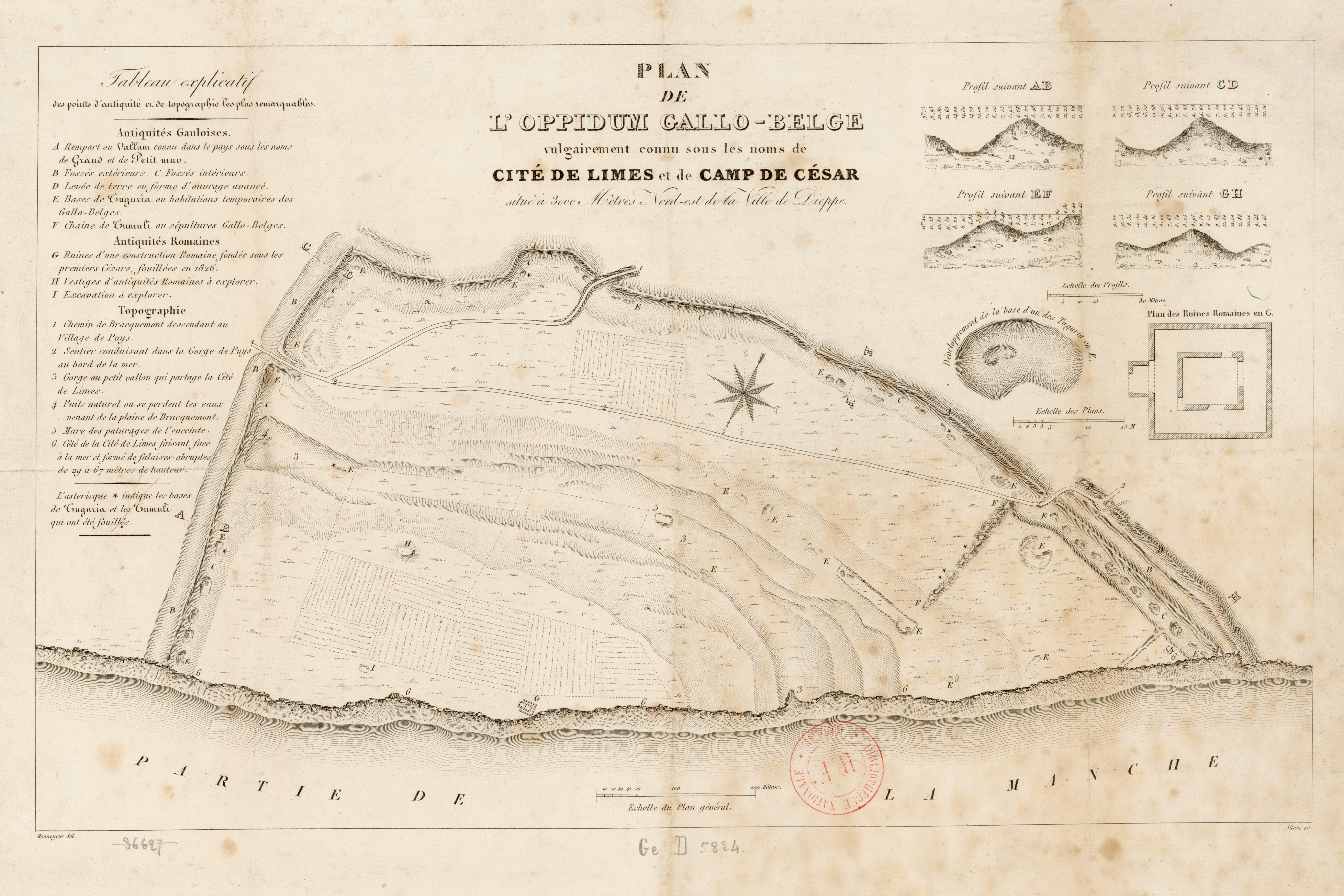 Plan de l'Oppidum gallo-belge vulgairement connu sous les noms de Cité de Limes et de Camp de César, près de Dieppe. Vers 1860 (?) - 40 x 25 cm - plan dessiné par Pierre-Jacques Feret, gravé par Monoyeur. Bibliothèque nationale de France, GED-5824